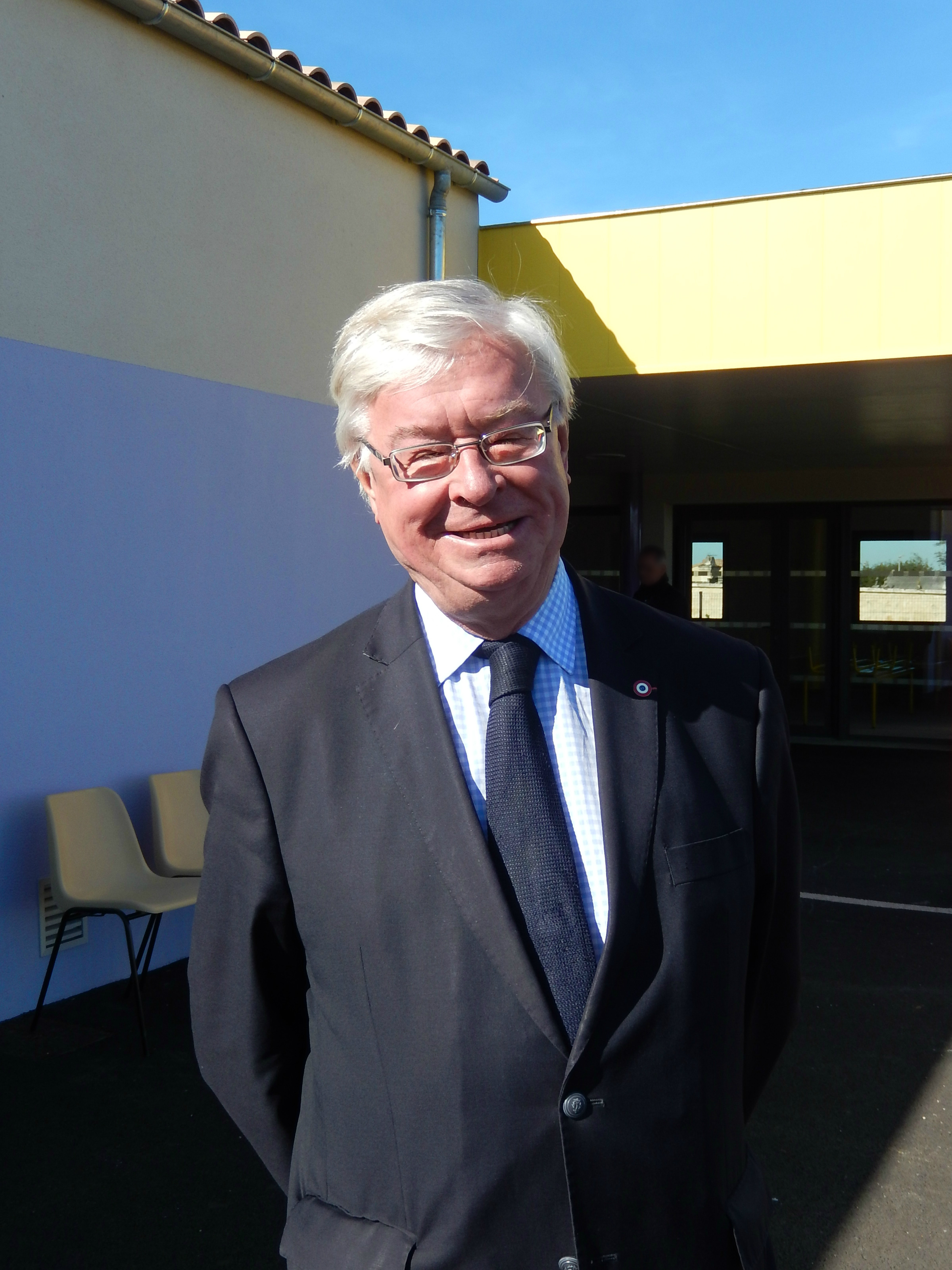 Le député français Didier Quentin, le 7 octobre 2017 à Plassay.